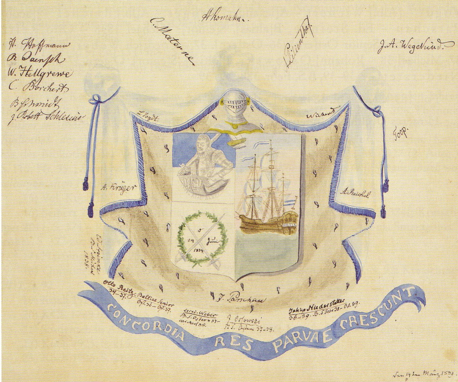 gezeichnetes Wappen der Königsberger Corpslandsmnnschaft Baltia (1834-1840)